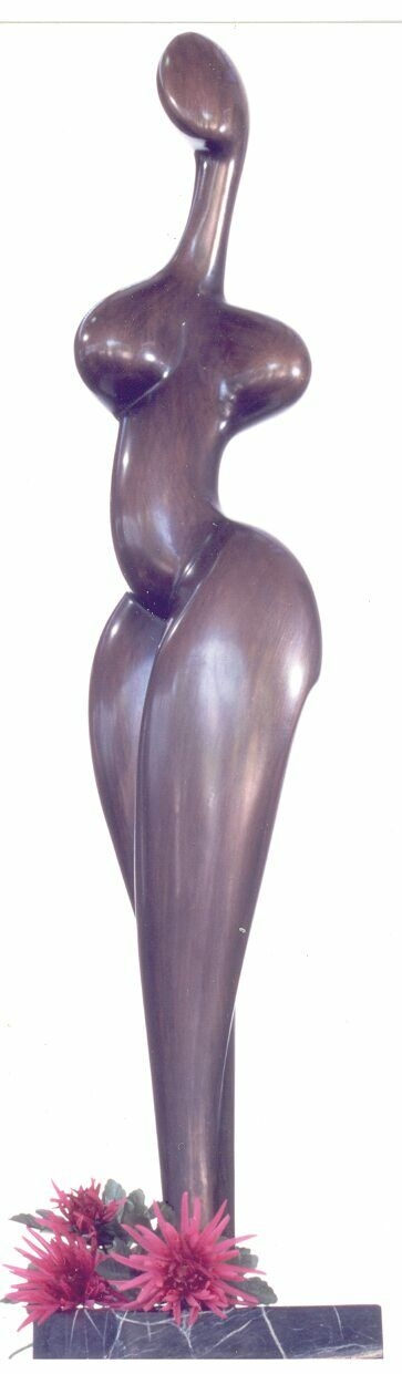 נערה עומדת, פסל של זהרה רובין